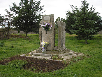 Monumento en homenaje a las víctimas del accidente ocurrido en el paso a nivel de Muñoz el día 21 de diciembre de 1978. (En: december 21th, 1978 railcrossing crash of Muñoz, Salamanca. Monument to the victims).